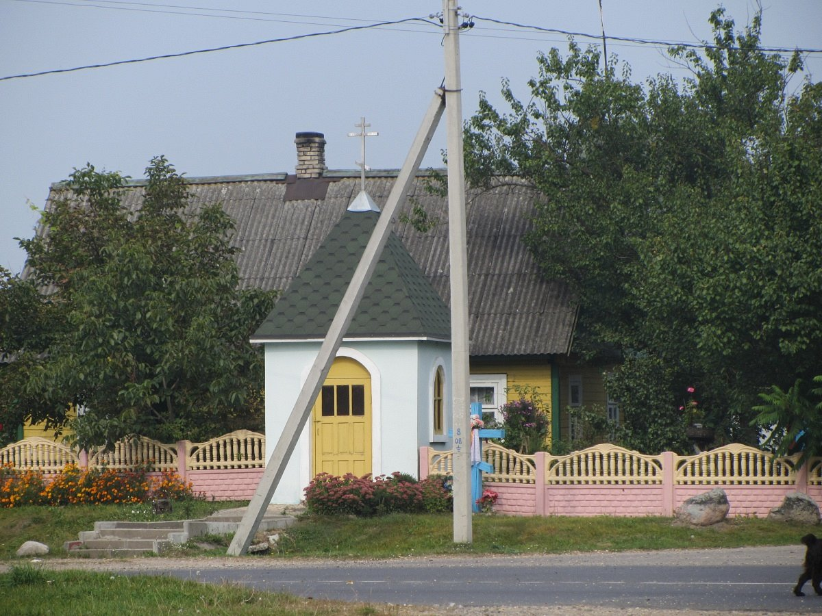 Расна